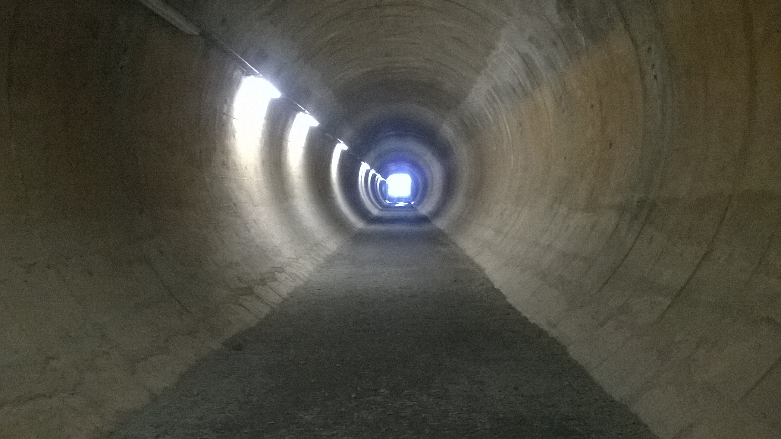 Pispalan uittotunneli